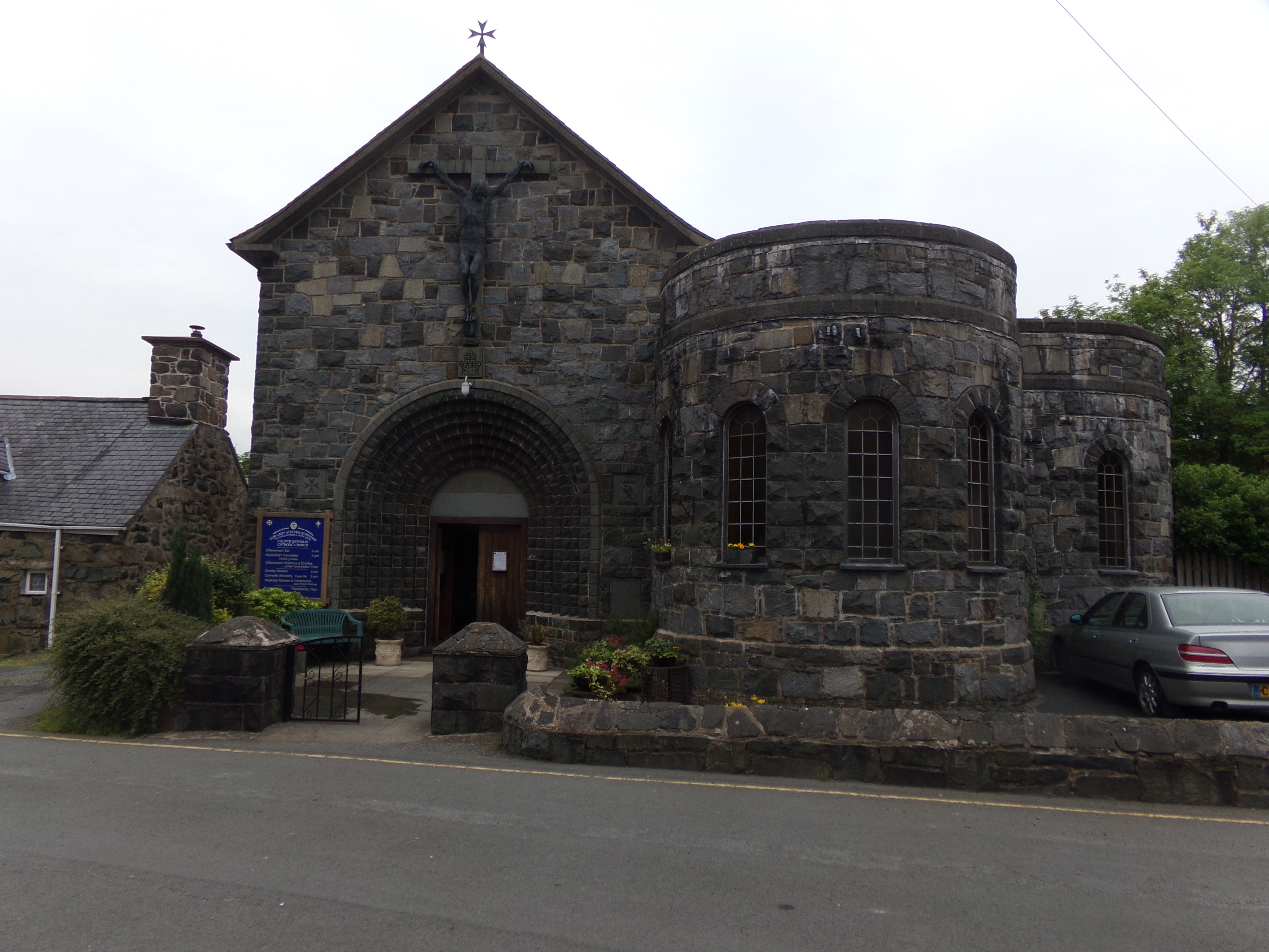 Eglwys Ein Morwyn o'r Saith Gofid, Dolgellau